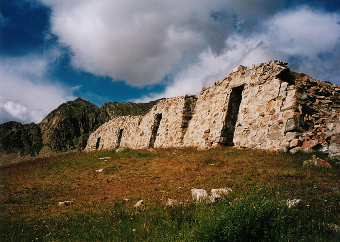 Militaire bouwwerken op de pashoogte van de Lombarda